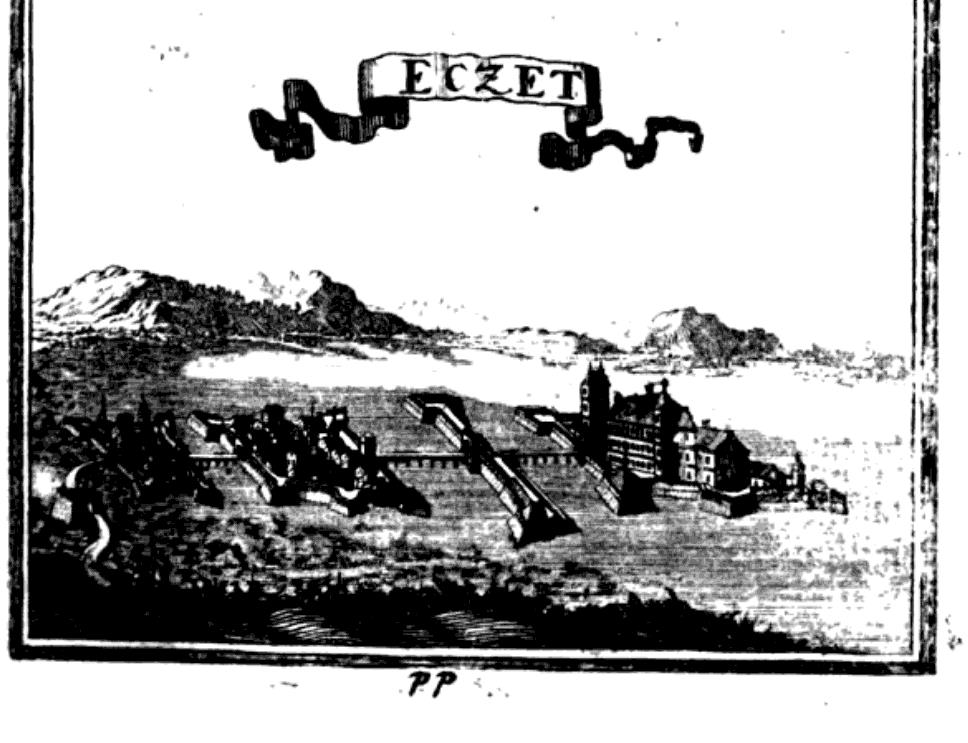 Ecsed vára Anton Ernst Burckhard von Birckenstein Auserwählter Anfang zu den mathematischen Wissenschaften című művében